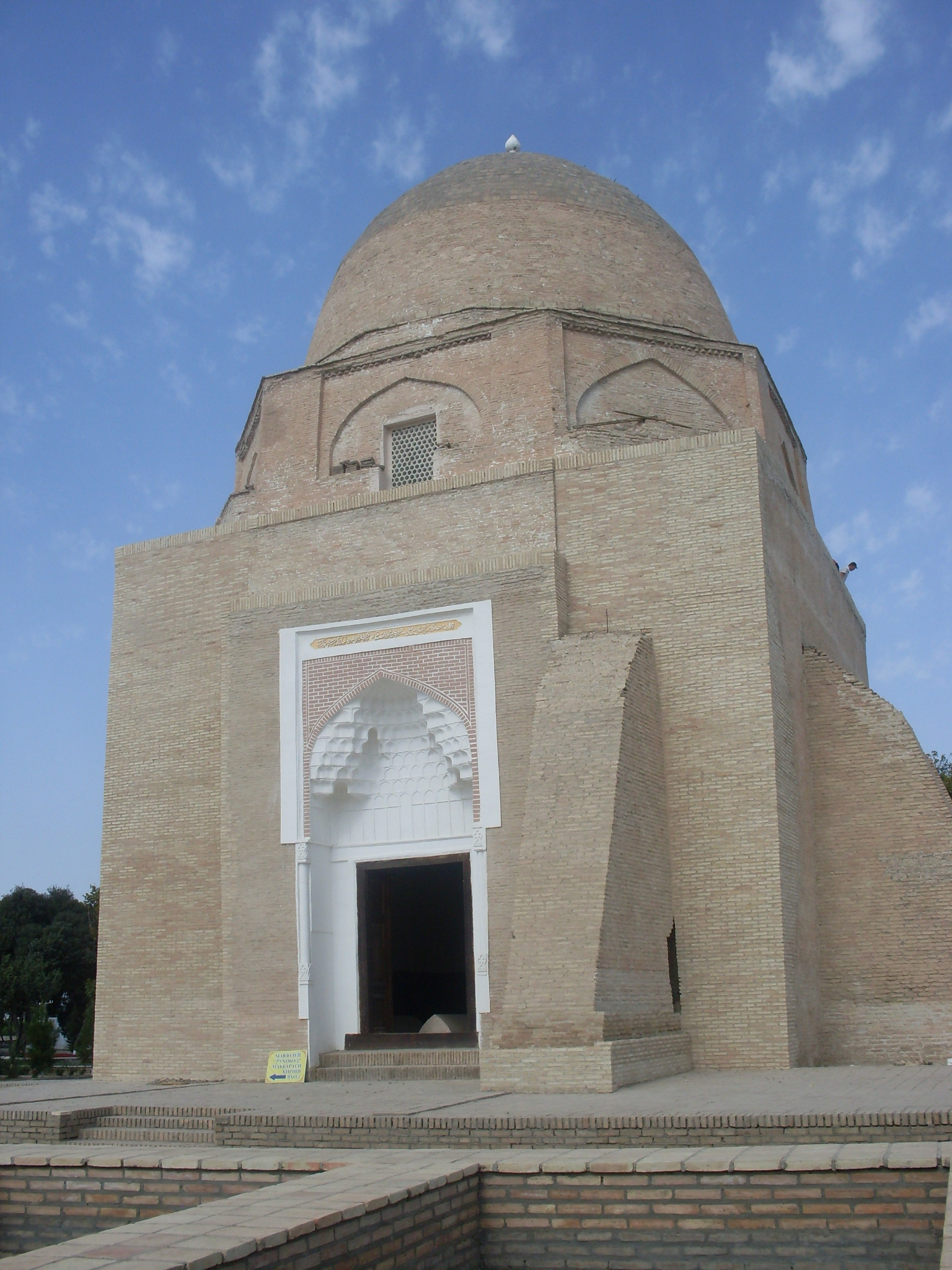 Mausoleum Ruhabad Мавзолей Рухабад